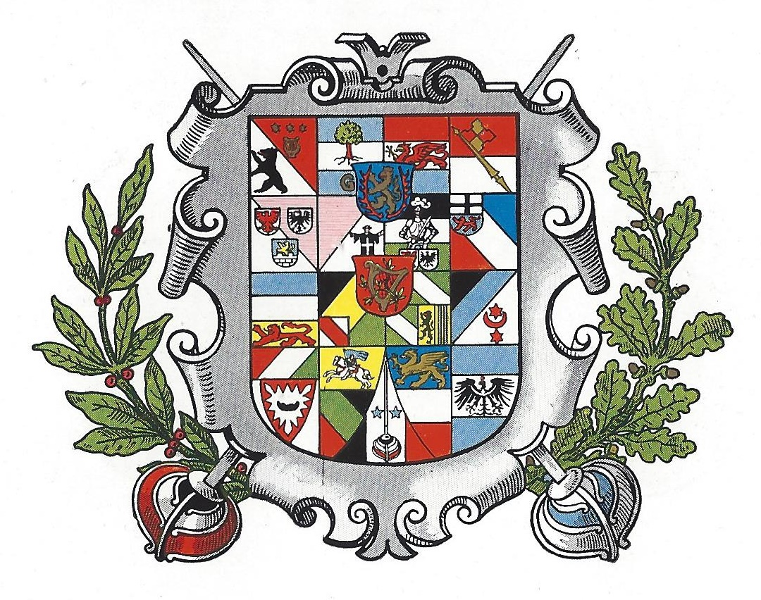 Wappen des Sondershäuser Verbandes